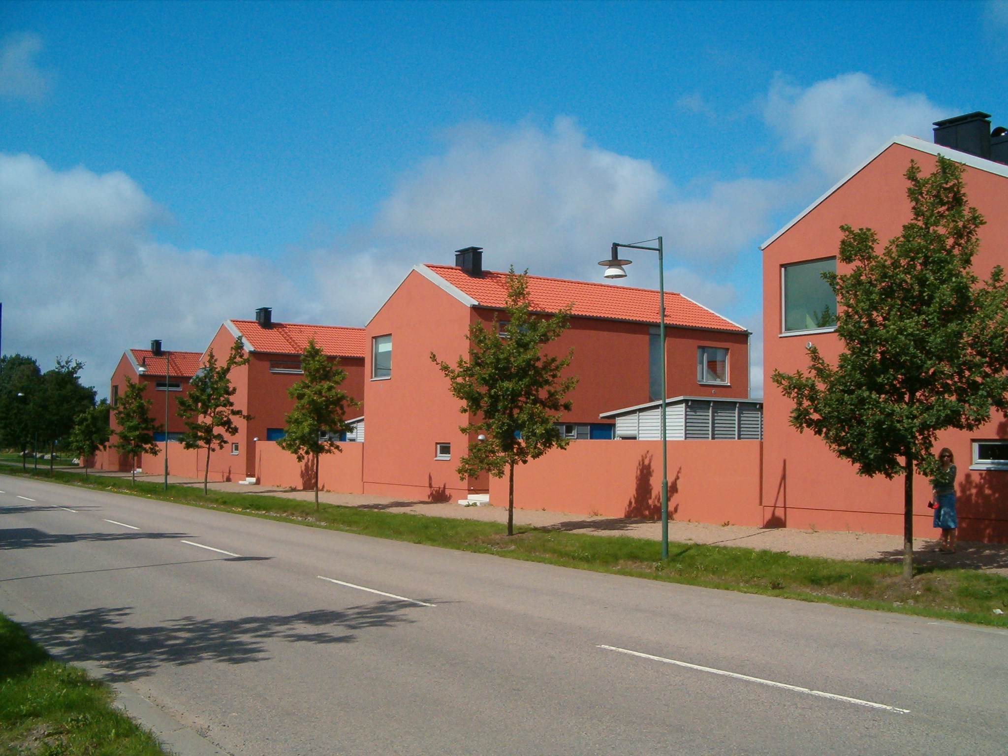 Buildings in Mariastaden, Helsingborg.